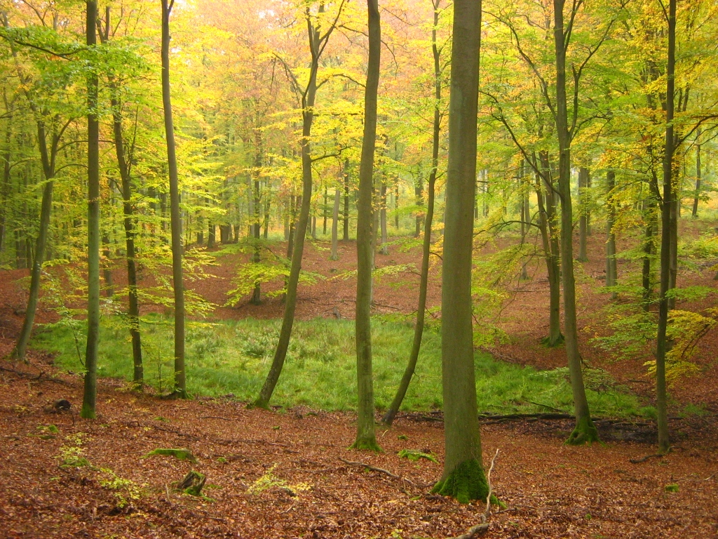 Brohmer Berge bei Rothemühl (Landkreis Uecker-Randow, Vorpommern).